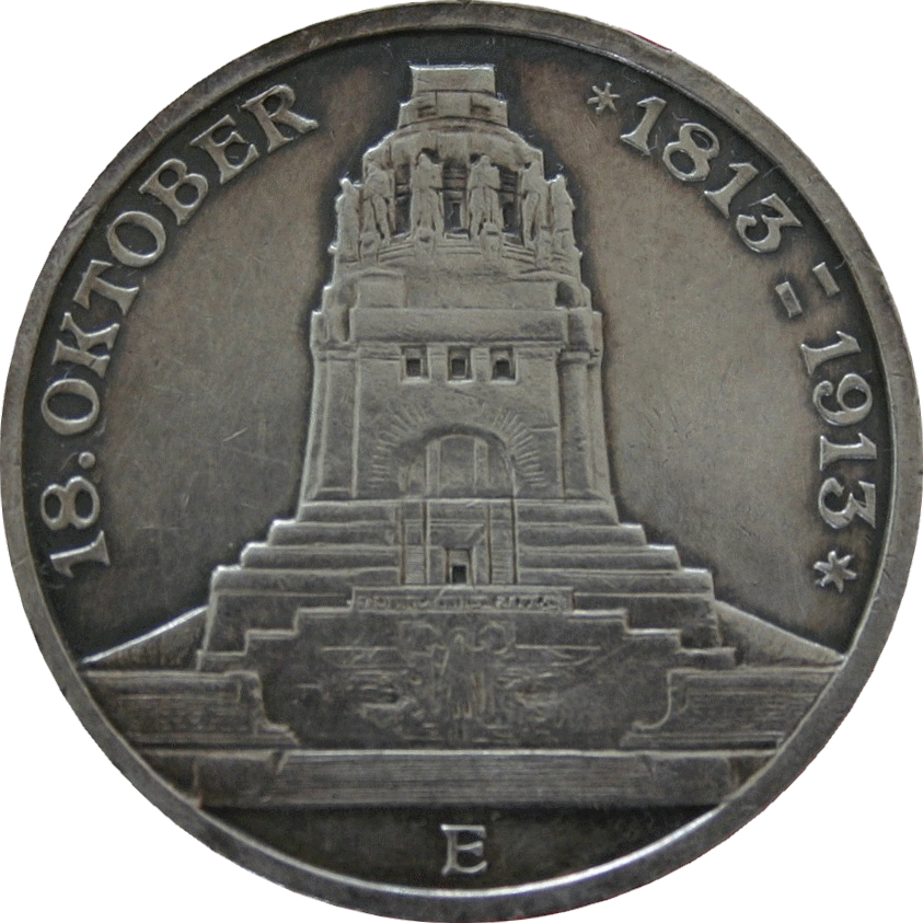 3 Mark Münze des Deutschen Reichs aus 1913 mit der Abbildung des Völkerschlachtdenkmals